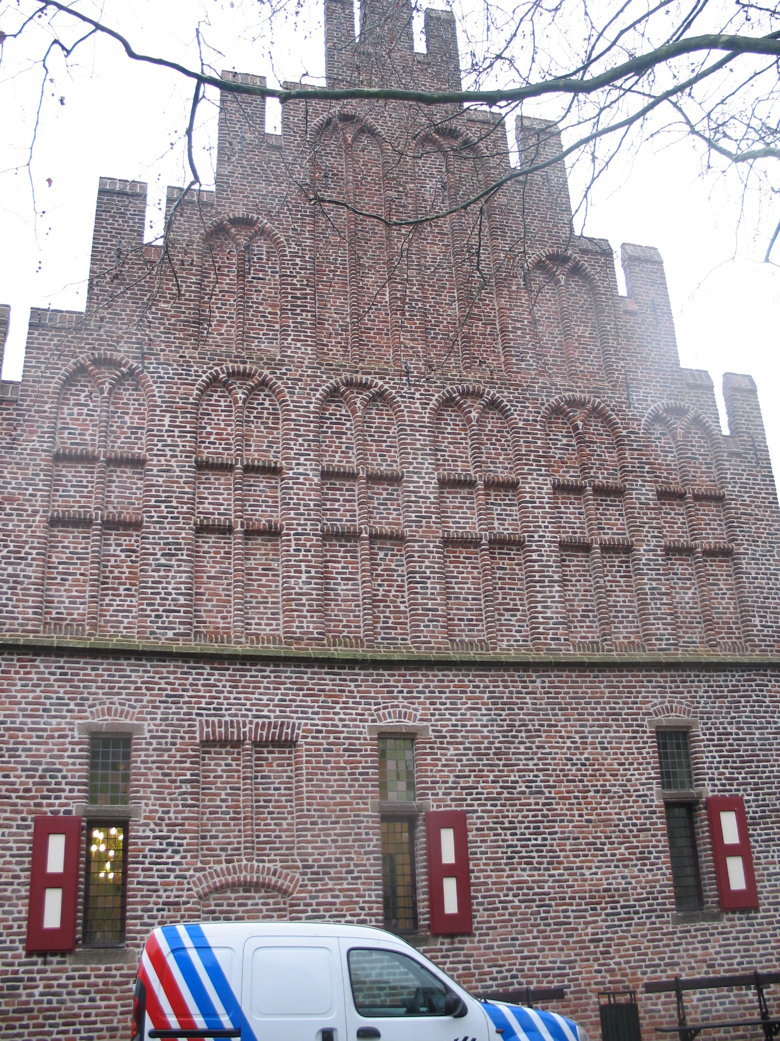 Rijksmonument in Doesburg